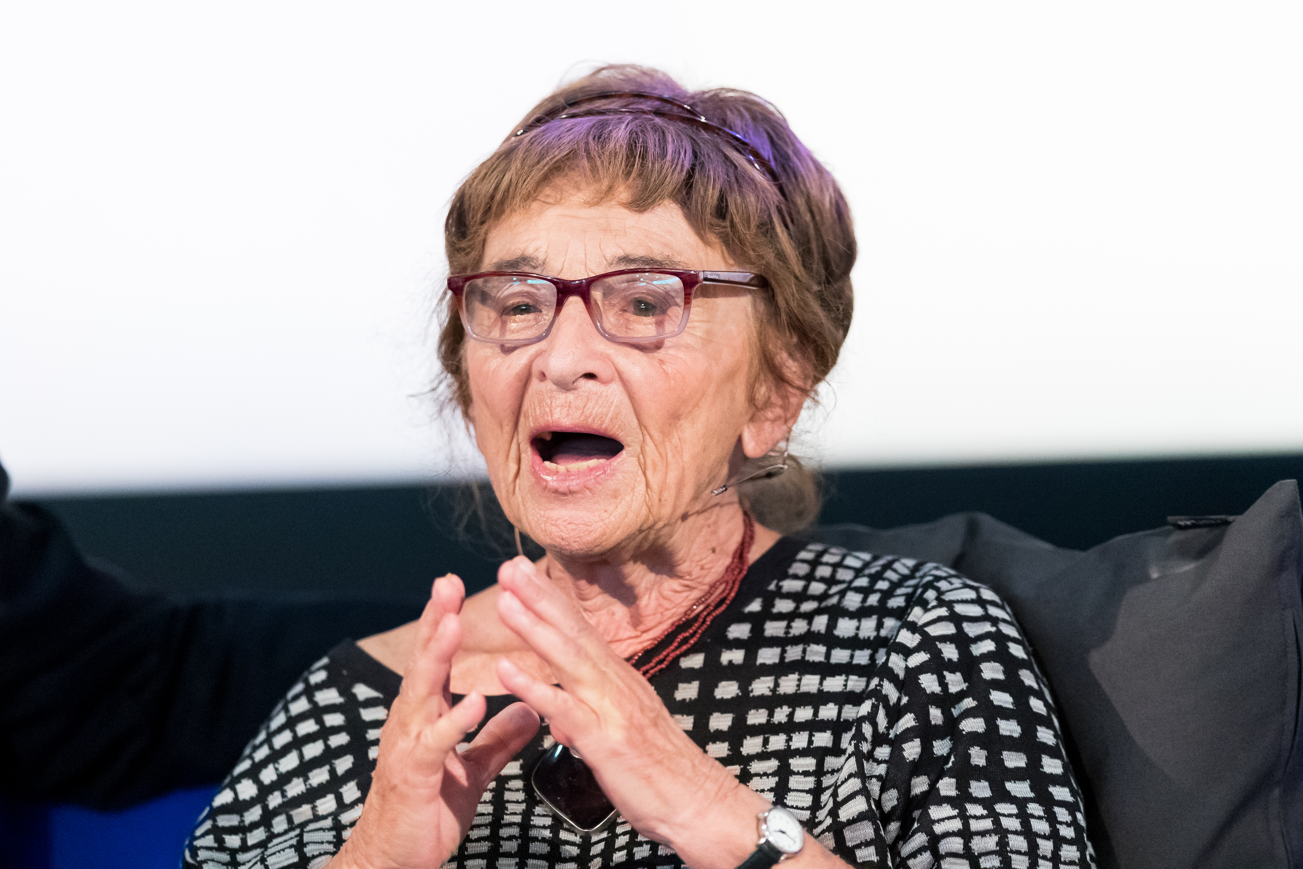 Ágnes Heller during Frankfurter Buchmesse at Messe Frankfurt, Frankfurt, Hessen, Germany on 2018-10-13, Photo